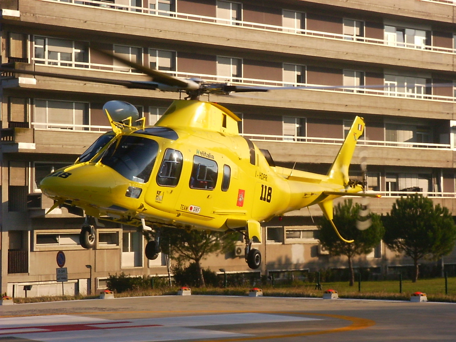 Elicottero A109E Power I-HDPR "Pegaso 1" del servizio di elisoccorso Regione Toscana in atterraggio sulla base dell'ospedale S.Maria Annunziata-Ponte a Niccheri (Firenze). Fonte Scattata da me.